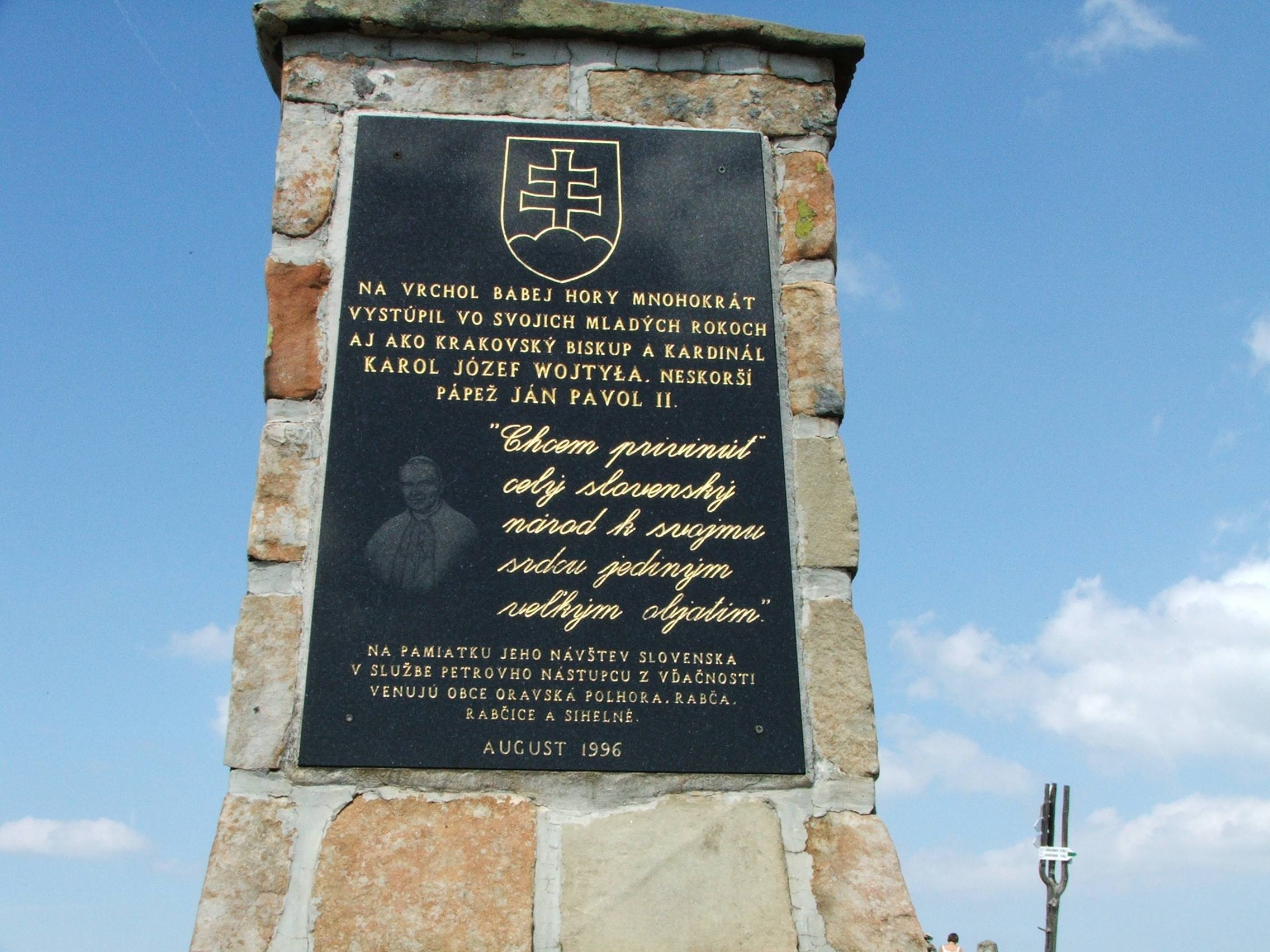 Babia Góra. Monument na szczycie.